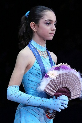 Евгения Медведева на Финале Гран При 2013 - Подиум